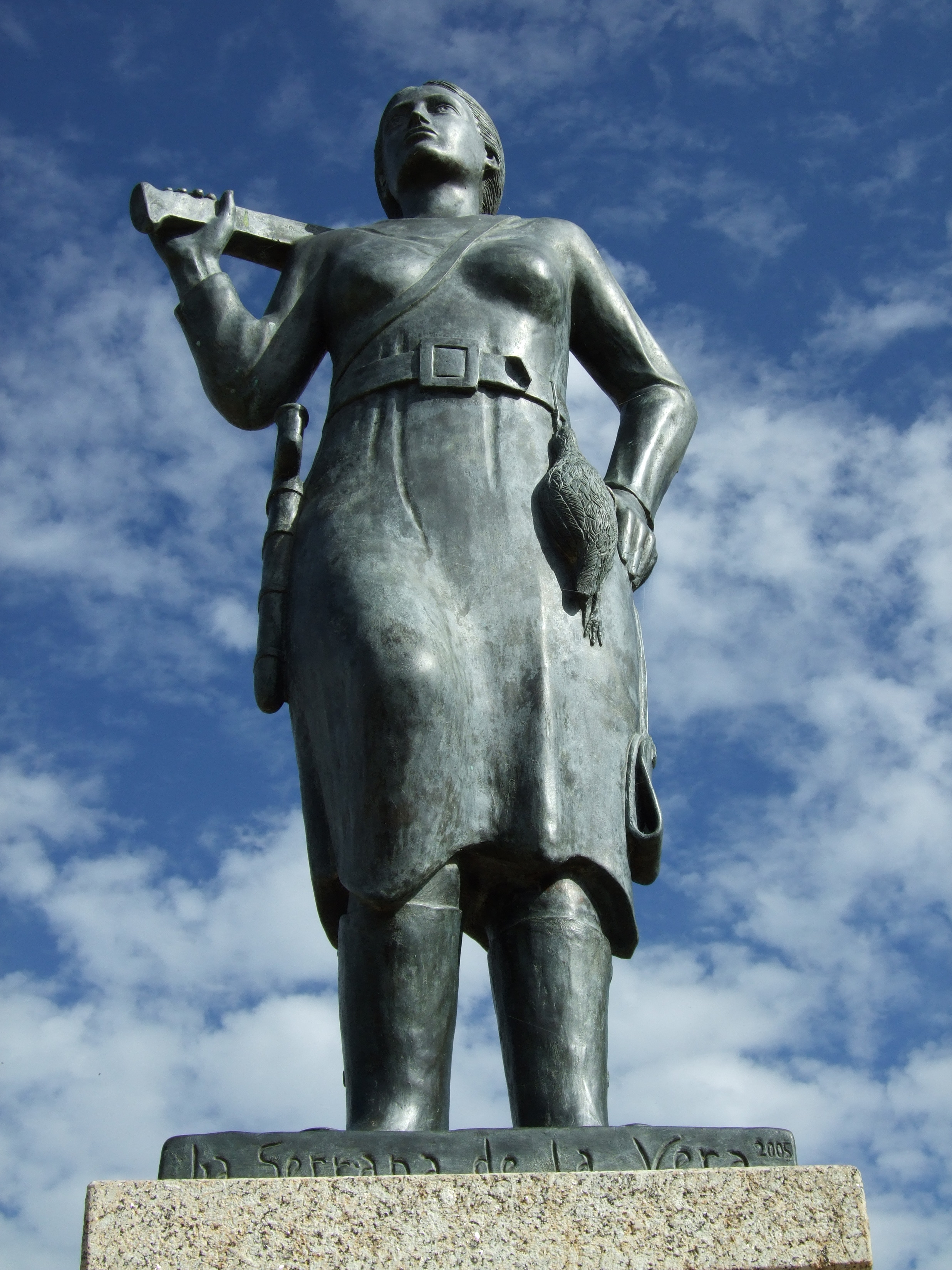 Estatua de la Serrana de la Vera en Garganta la Olla